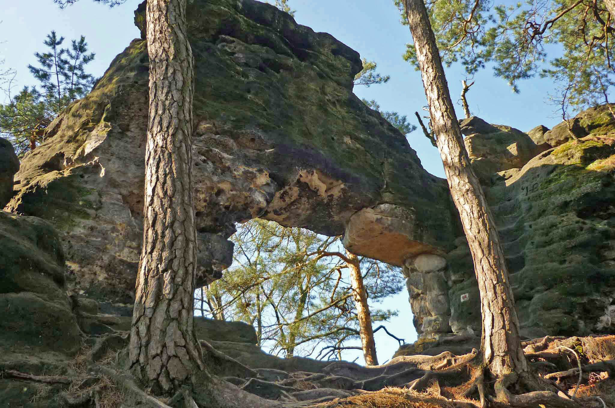 Kleines Prebischtor bei Hohenleipa (Vysoká Lípa) in der Böhmisschen Schweiz